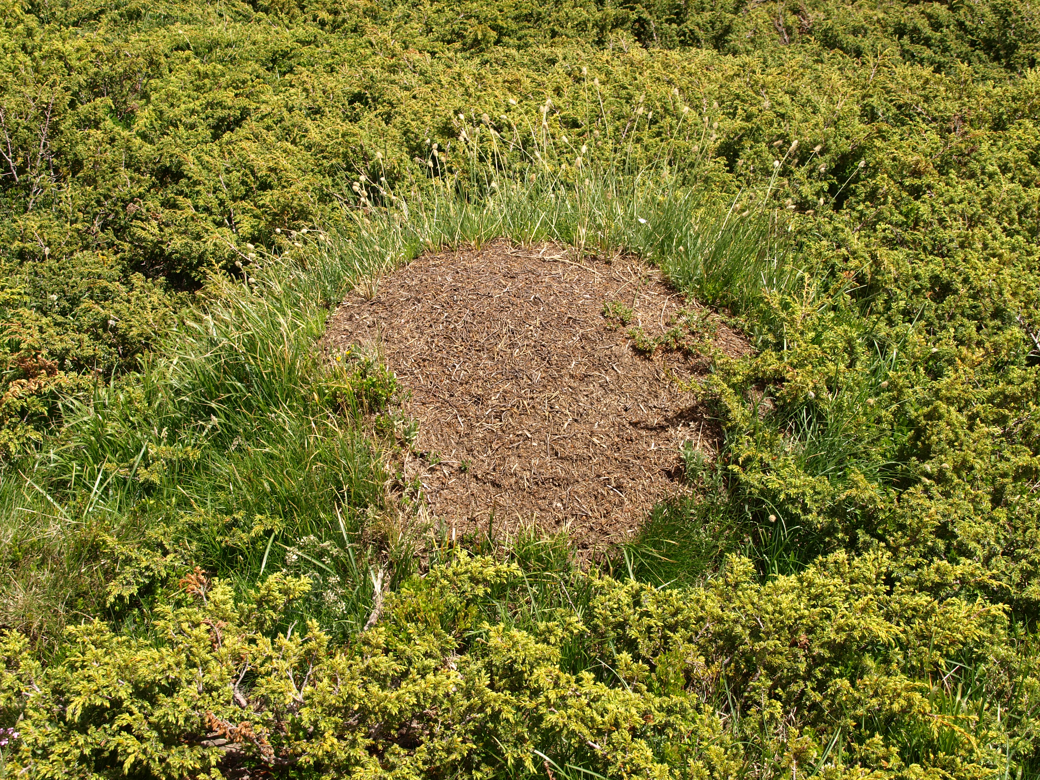 Мравуняк при Седемте рилски езера